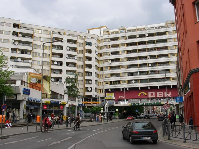 Berlin-Kreuzberg, "Kotti" Sozialer und 1.Mai-Brennpunkt Selbst fotografiert, Mai 2004 GNU FDL